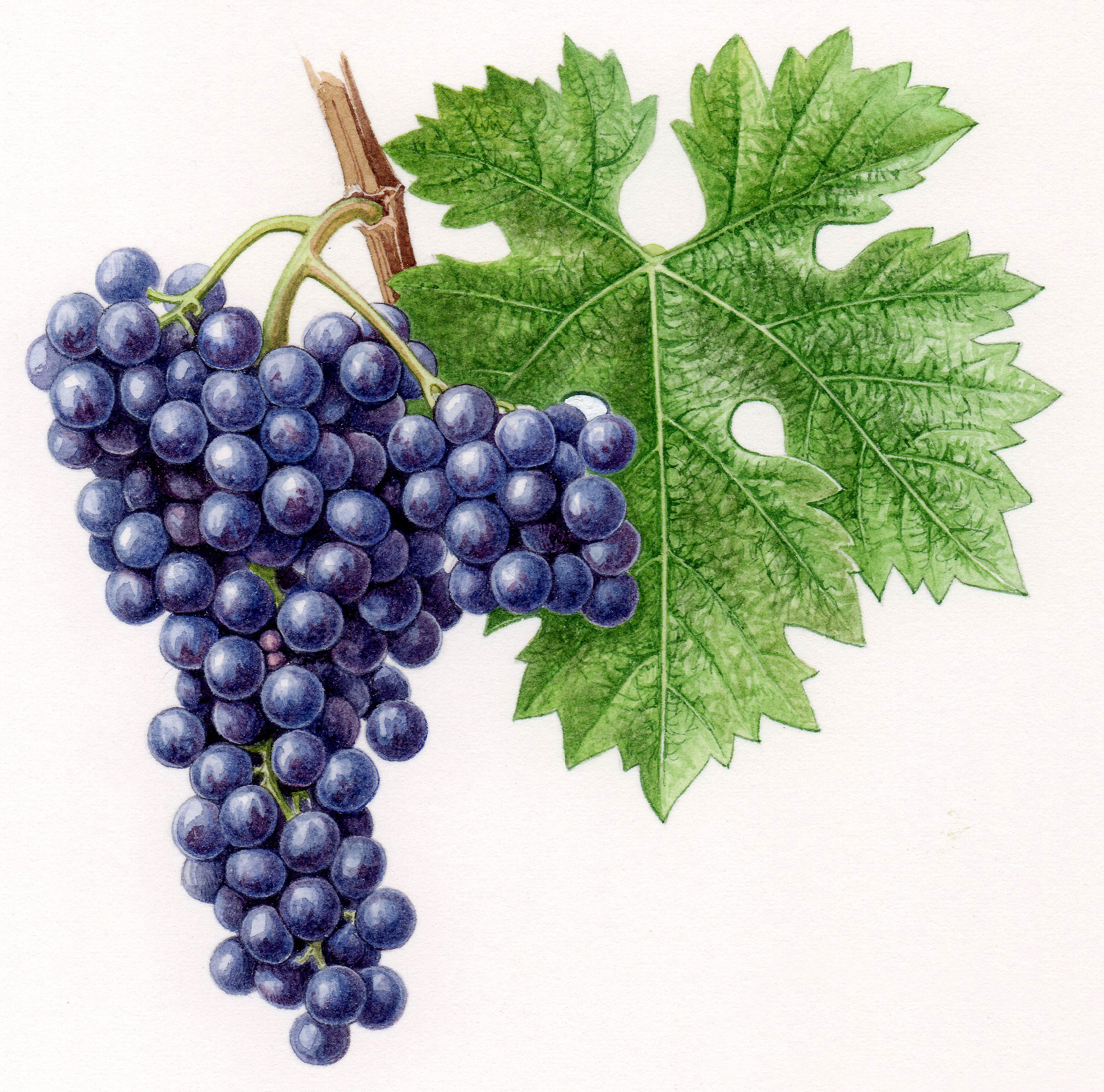 Aquarelle originale pour les Cépages de France (2001)